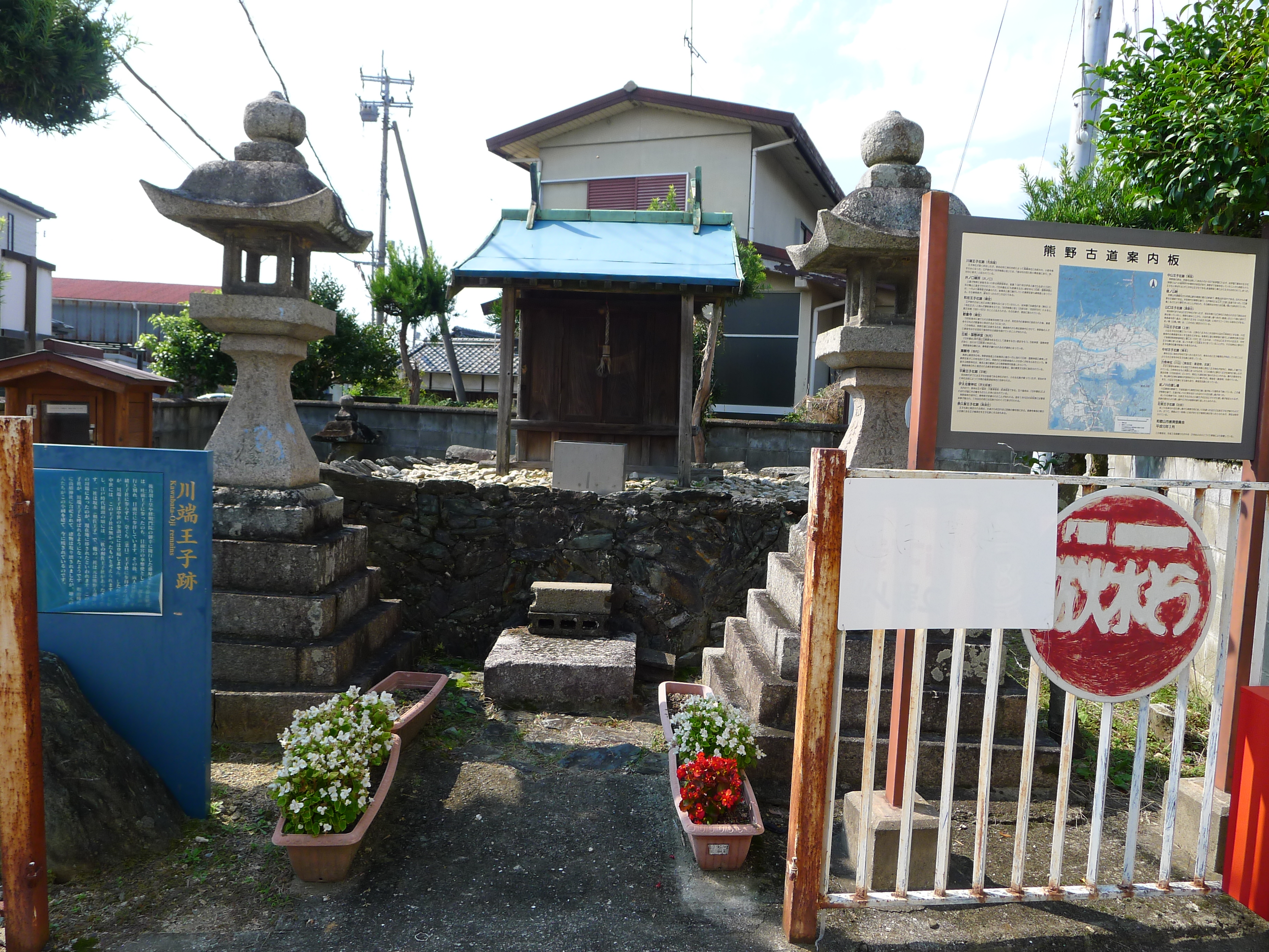 熊野古道・紀伊路の九十九王子の一つ川端王子（和歌山県和歌山市）